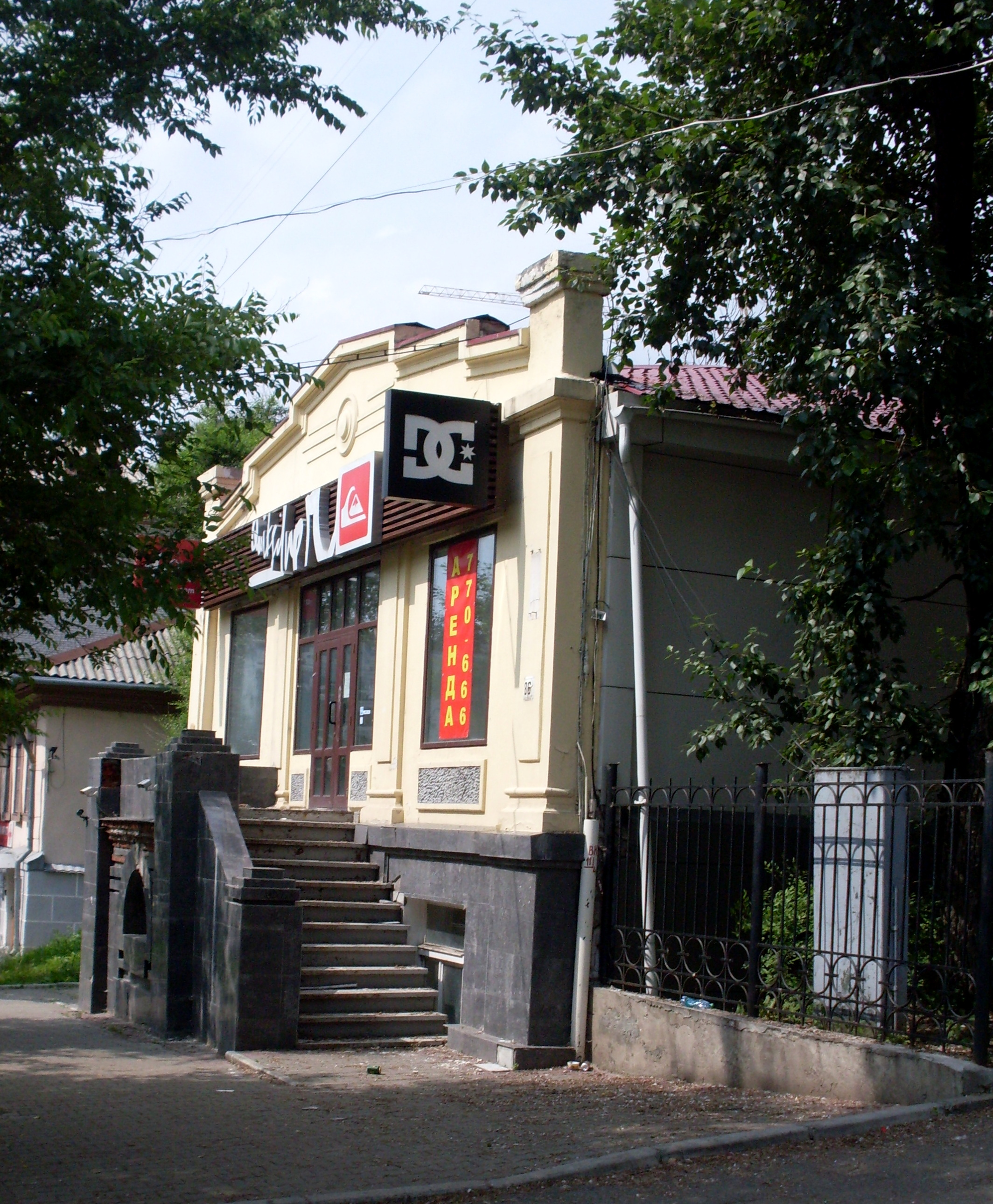 Здание, в котором в 1925-1965 годах размещалась редакция газеты "Тихоокеанская звезда".